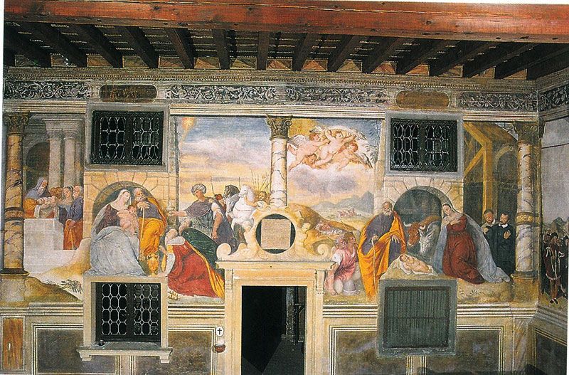 Padova - Scoletta del Carmine